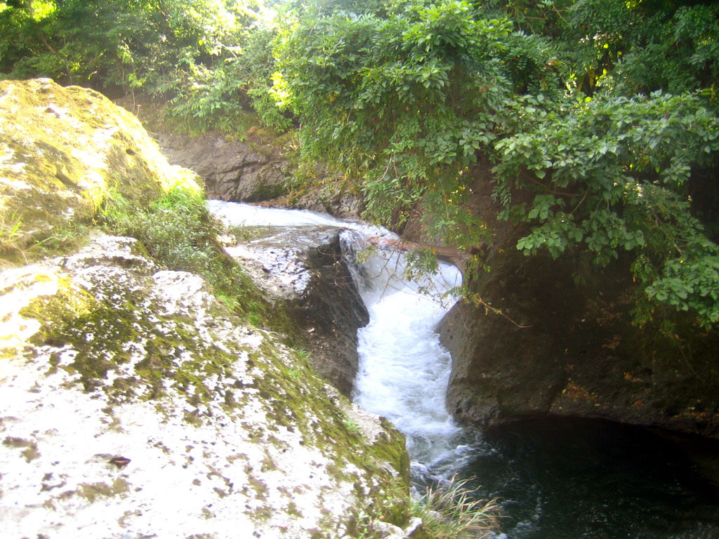 Nametsukodaki fall